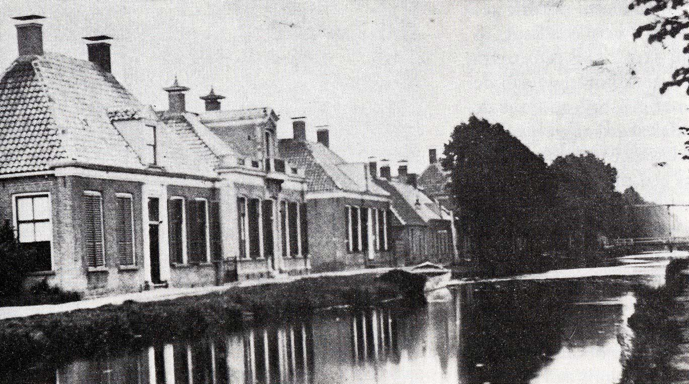 Venendaal in Hoogeveen in de 19e eeuw